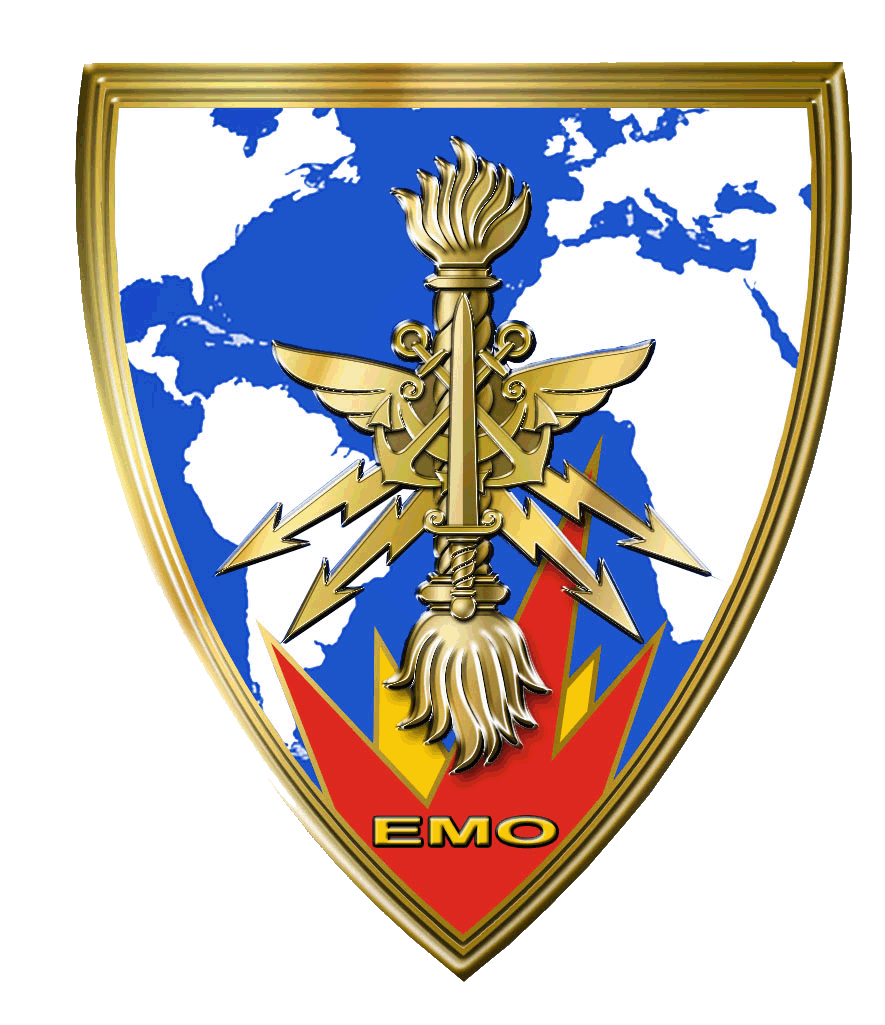 Insigne de l'état-major opérationnel du Service interarmées des munitions